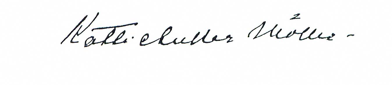 Katti Anker Møller Signatur 1929 Unterschrift zu einer autobiographischen Skizze in Führende Frauen Europas, 2 Bände. München 1928 und 1930